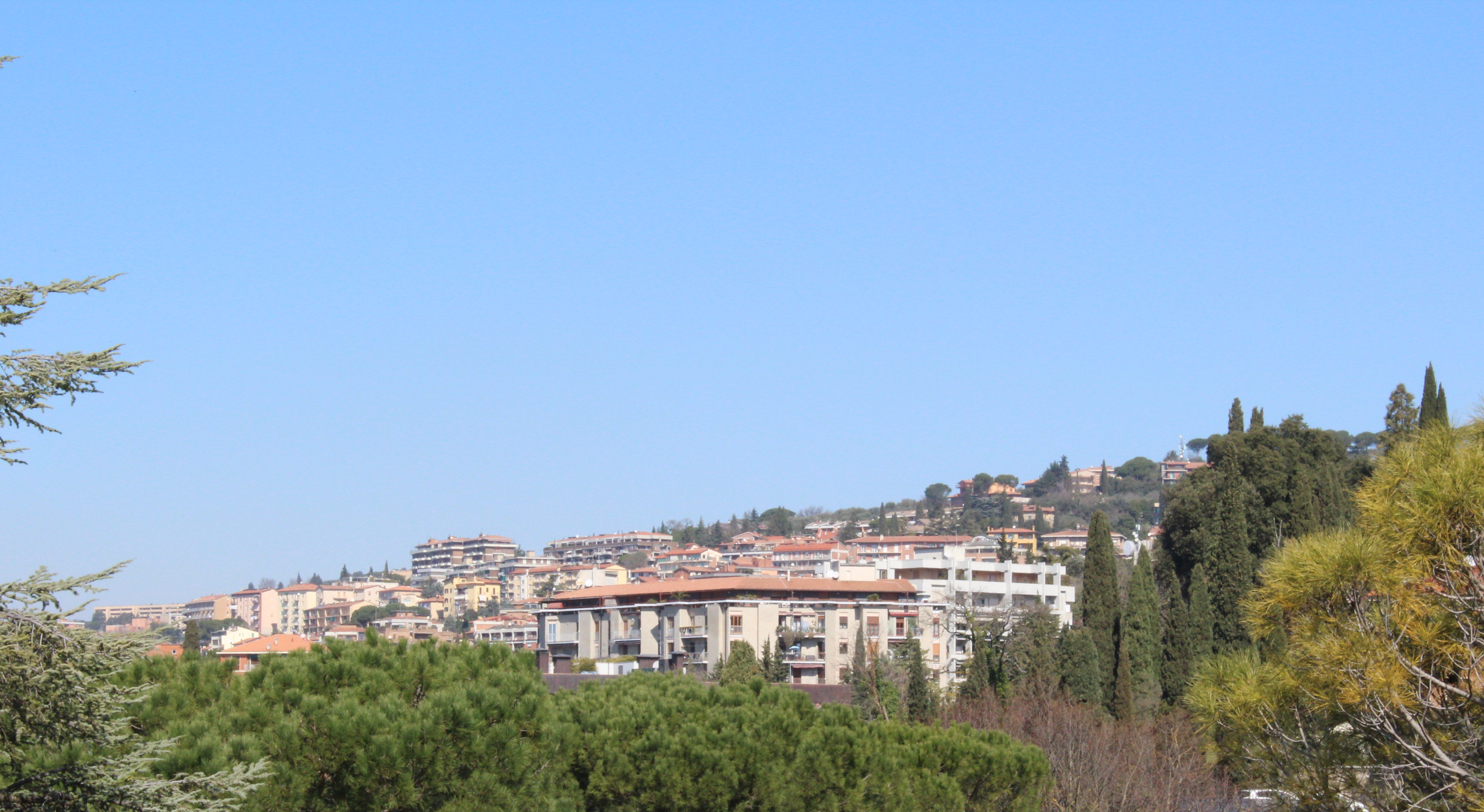 Vista da Via Ruggero d'Andreotto